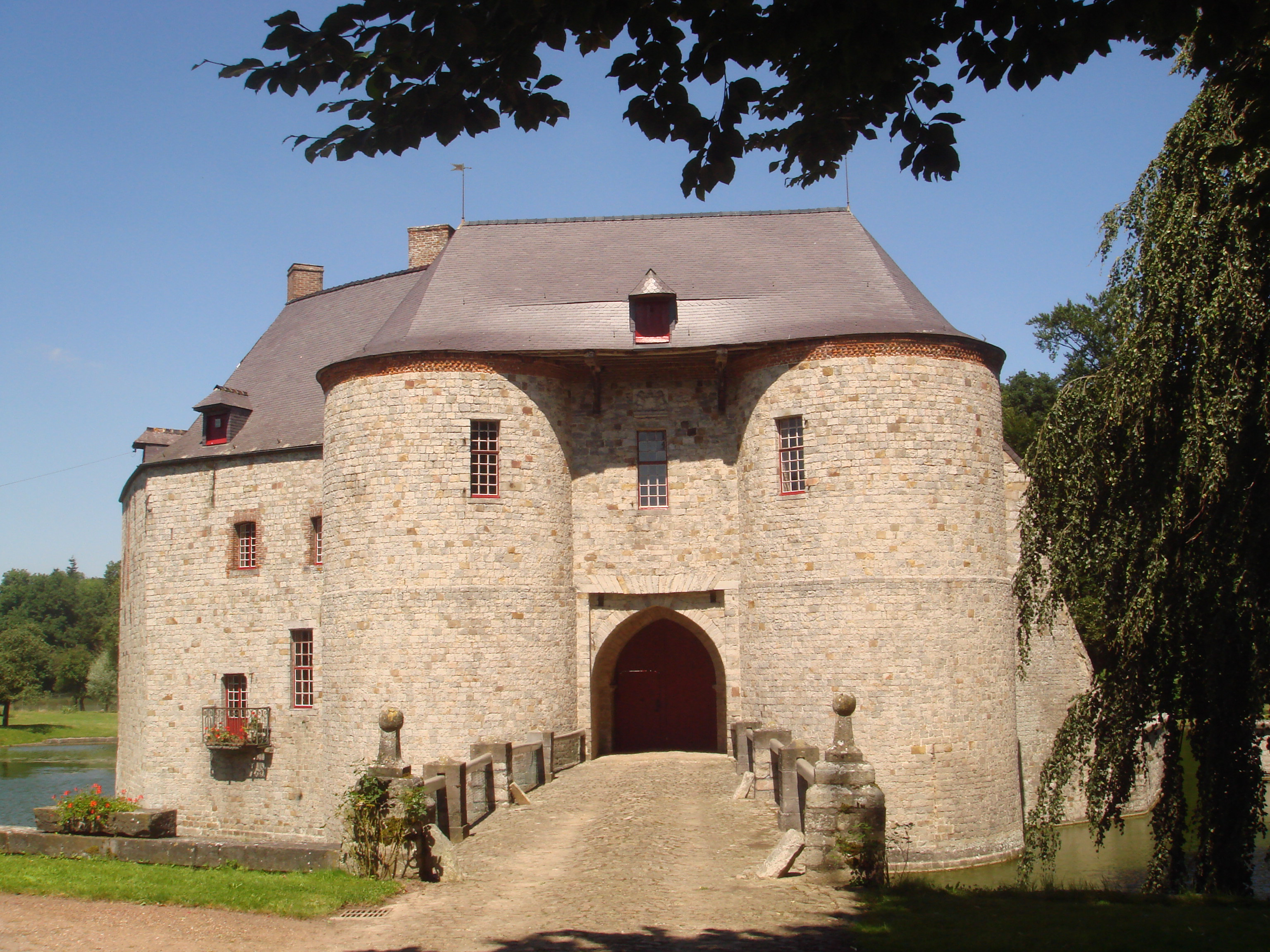 Châtelet d'entrée du Château de¨Potelle